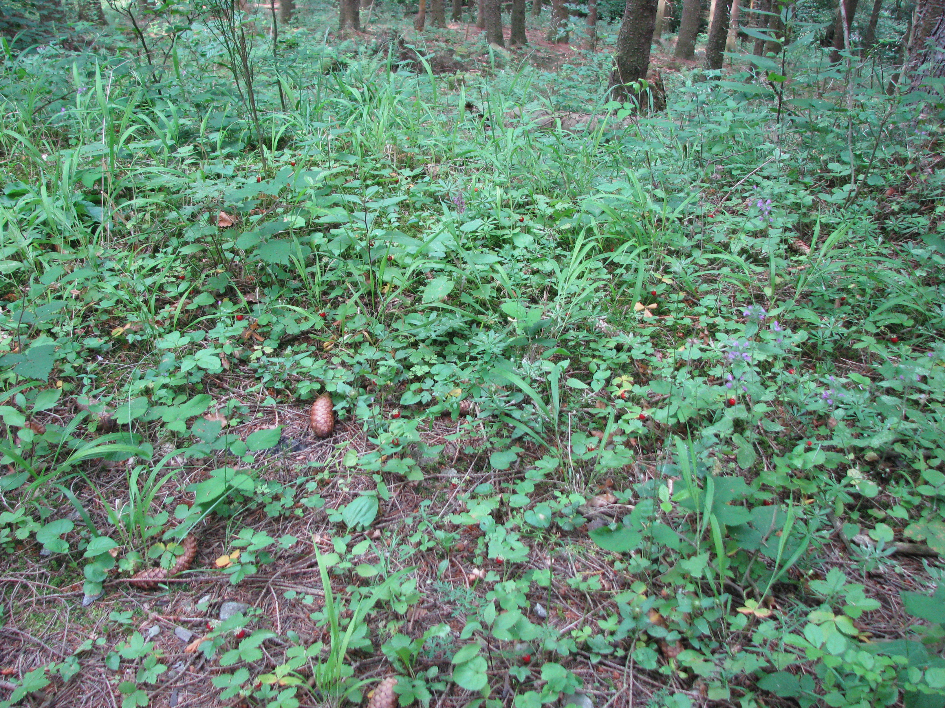 Wald-Erdbeeren auf dem Waldboden am Rande eines Wanderwegs auf dem Kermeter im Nationalpark Eifel.